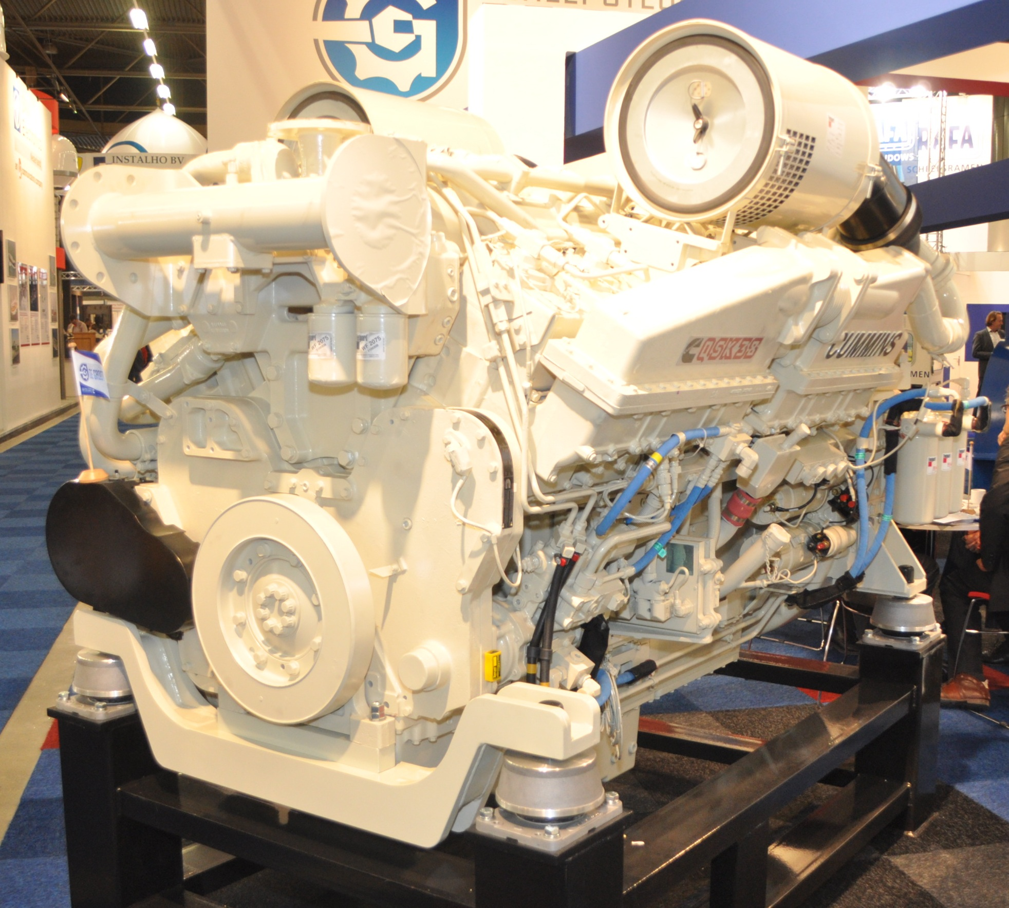 QSK38-M TIER 2 CONFIGURATIE: V-12 UITVOERING TURBO / AFTERCOOLED INHOUD 38 LITER BORING & SLAG 159 x 159 EMISSIE EPA TIER 2 / EU GECERTIFICEERD